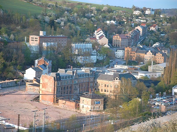 komplette Firmengebäude der Gebr. Albert KG